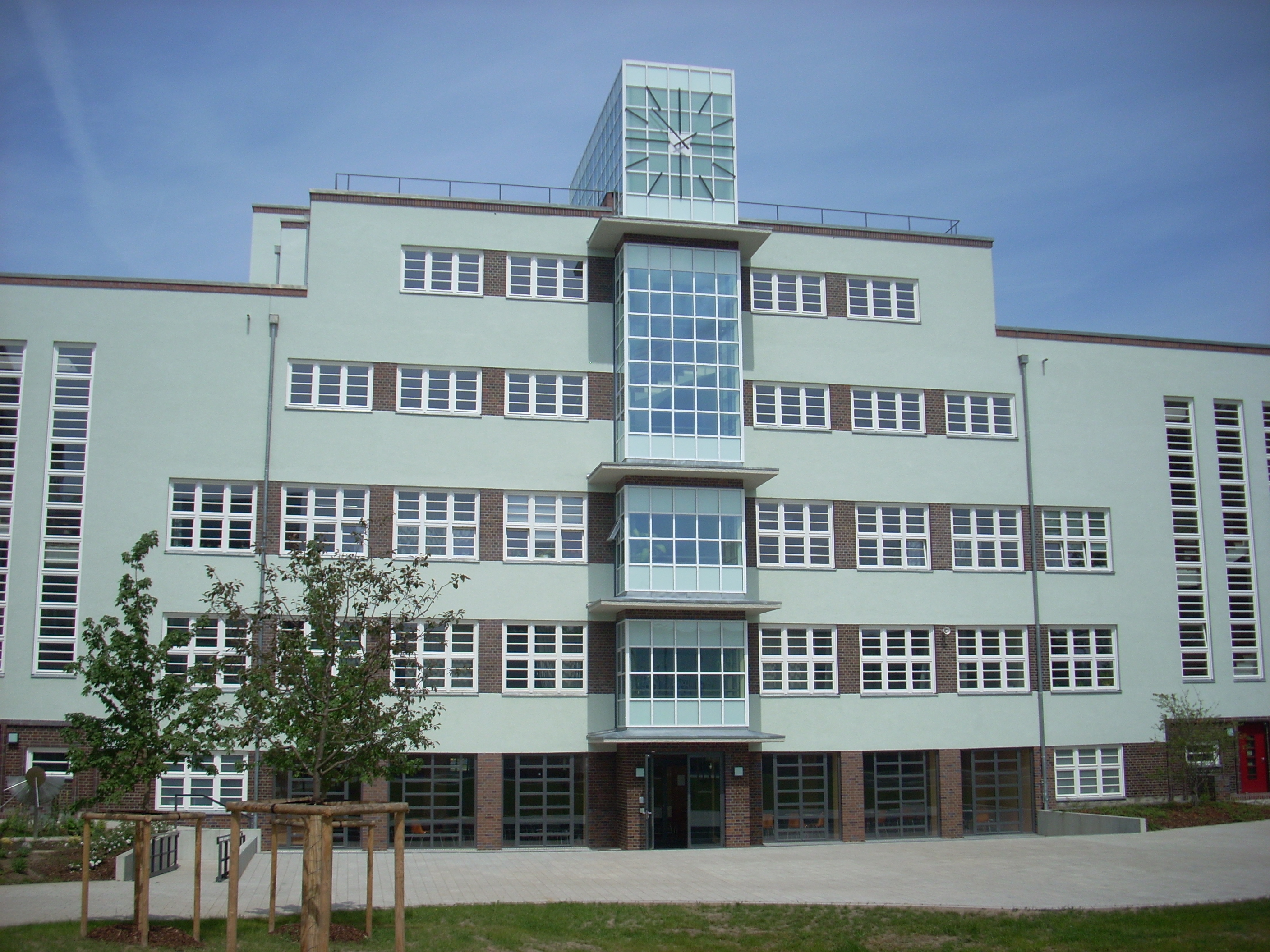 Uhrturmfassade im Innenhof